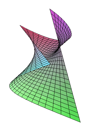 Surface réglée Licensing Source : image créée par l'auteur (Theon)